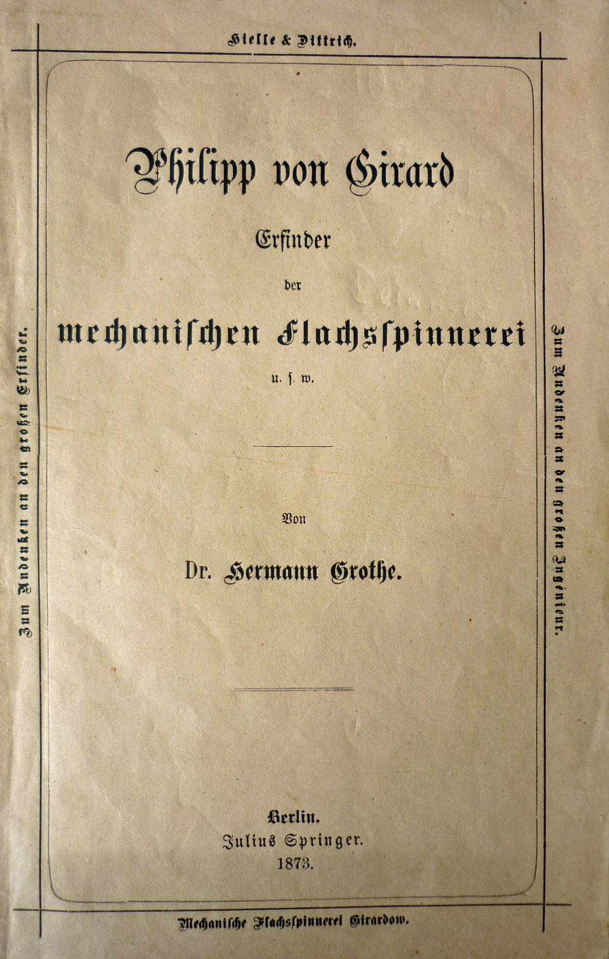 Titelblatt der Broschüre über Philipp von Girard - Erfinder der mechanischen Flachsspinnerei von Hermann Grothe, Verlag Julius Springer, Berlin 1863 (Nachauflage 1873), 26 S.